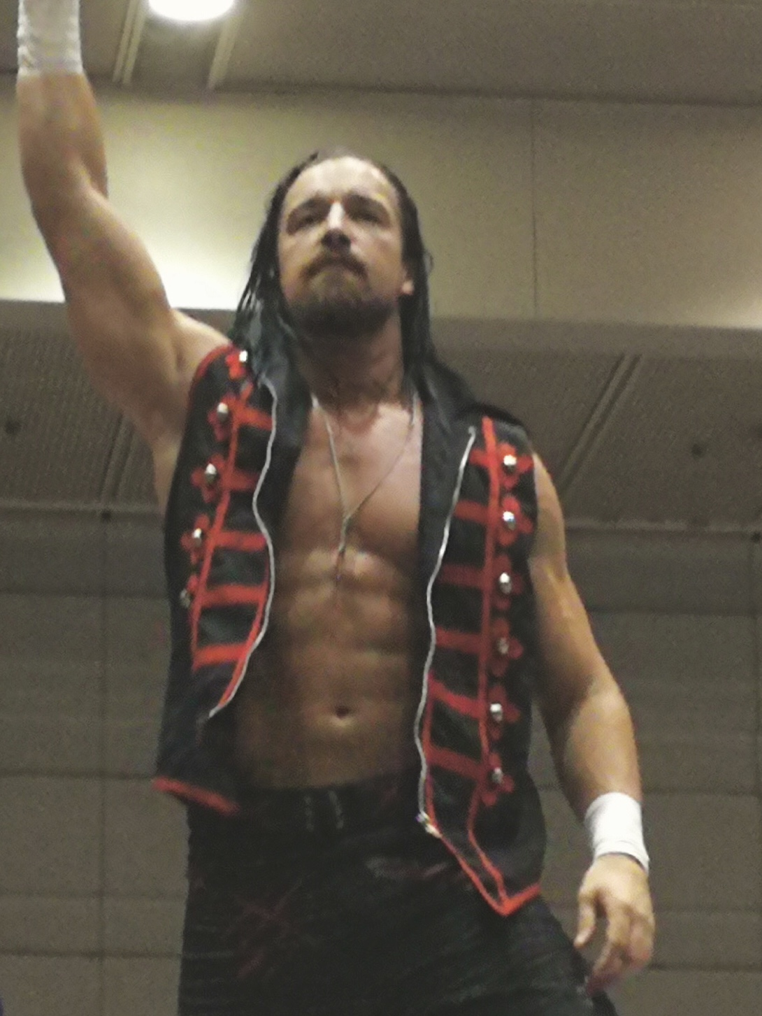 2019年9月12日 大阪・大阪府立体育会館・第2競技場（エディオンアリーナ大阪） ジェイ・ホワイト